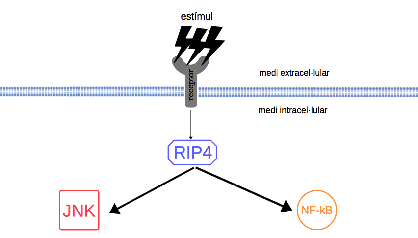 Quan el receptor rep un estimul, activa RIP4 que a la vegada activa les vies de senyalització JNK i NF-kB.